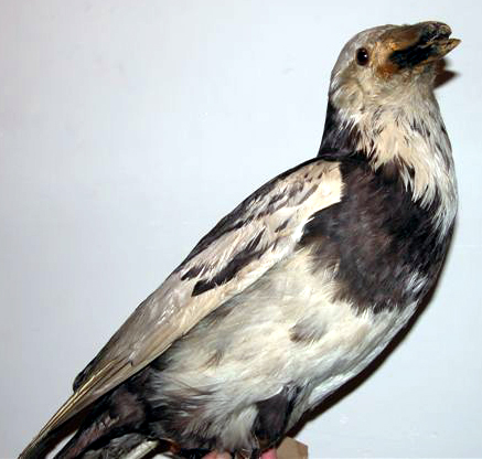 Pied Raven, Zoologisk Museum. Copenhagen